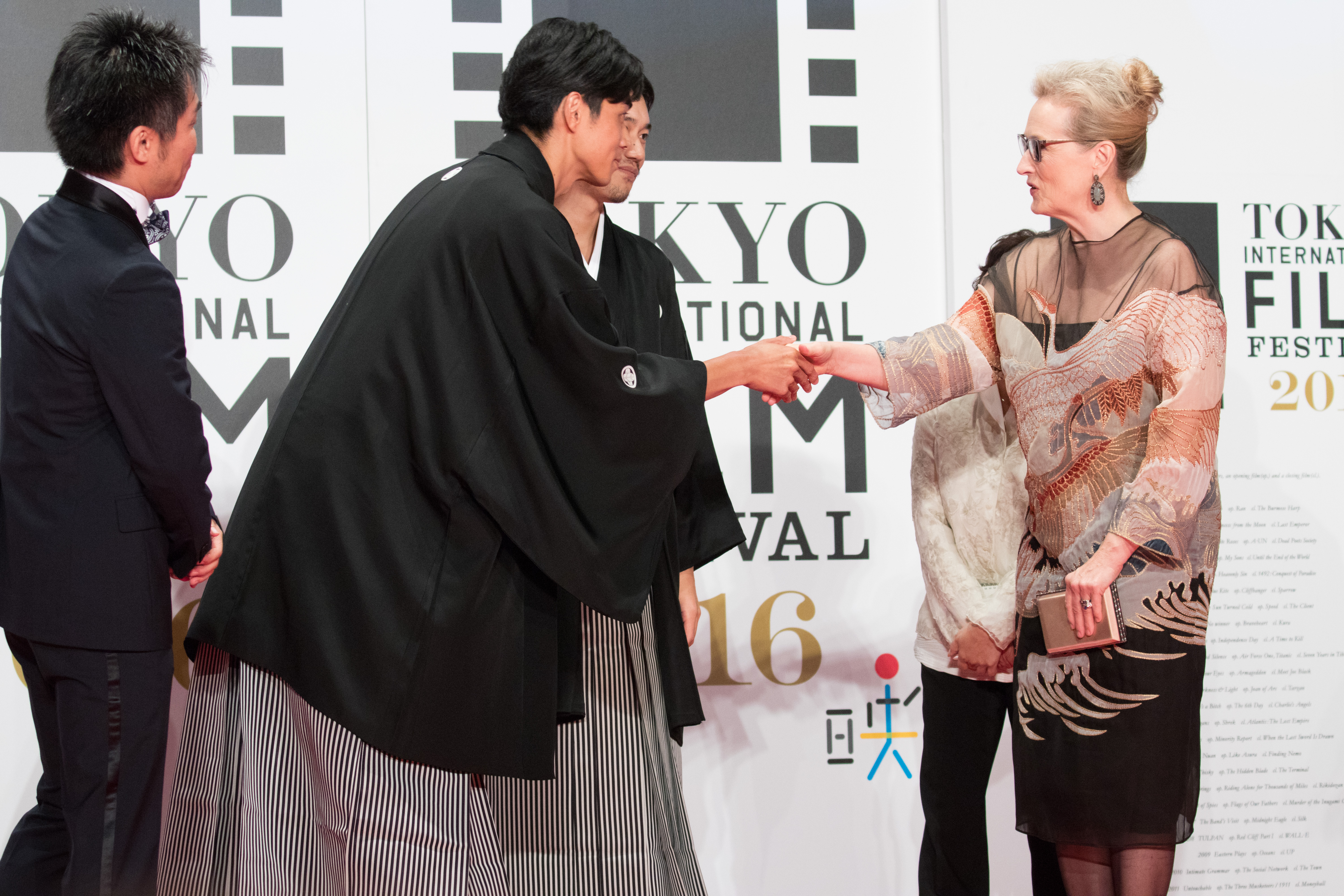 第29回 東京国際映画祭 オープニングセレモニー 松山ケンイチ 東出昌大 森義隆 メリル・ストリープ